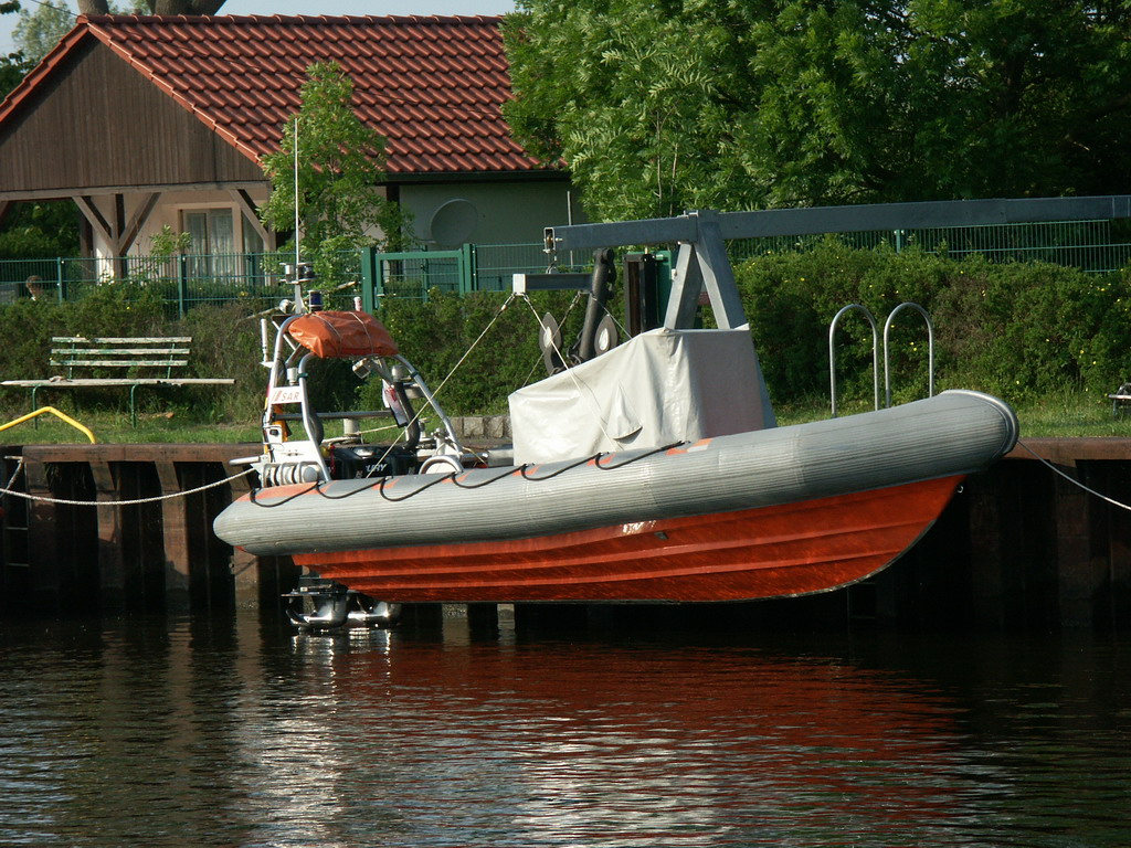 Rescue Uecker am Liegeplatz